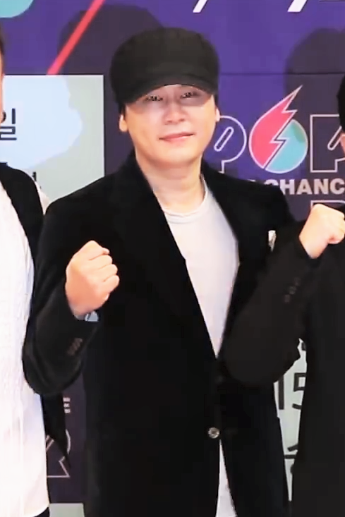 [TV10] 11월 10일 SBS 'K팝스타6-더 라스트 찬스' 제작발표회 현장